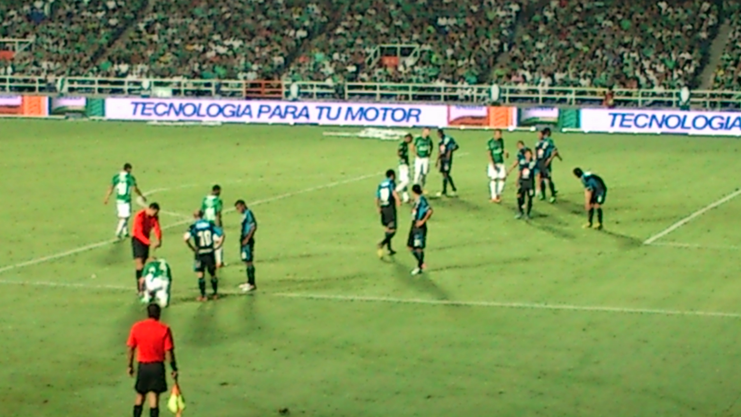 Partido por la 15ª fecha de la Liga Postobon